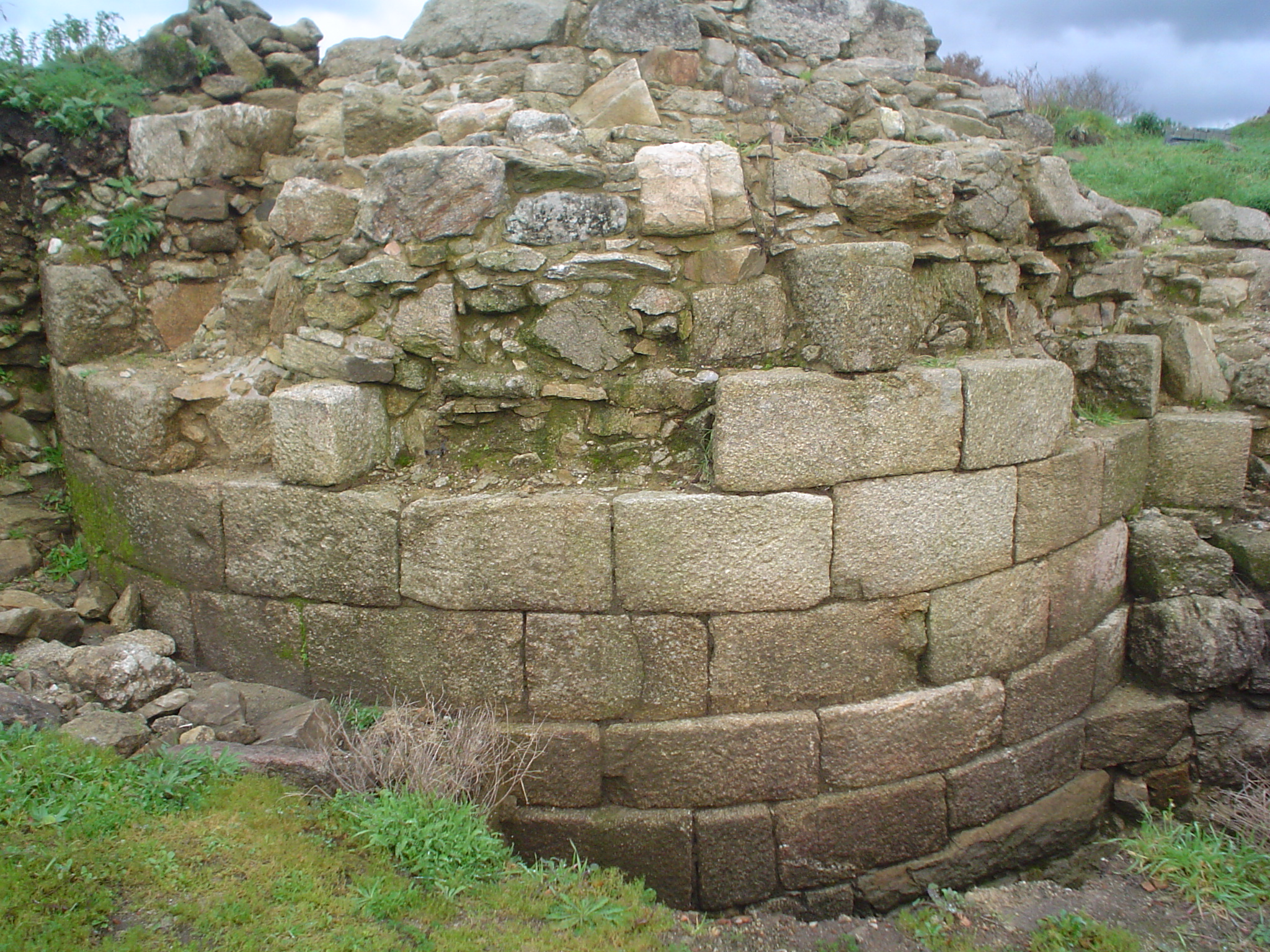 Castelo da Rocha forte. Conxo - Santiago. Base dún dos torreóns.